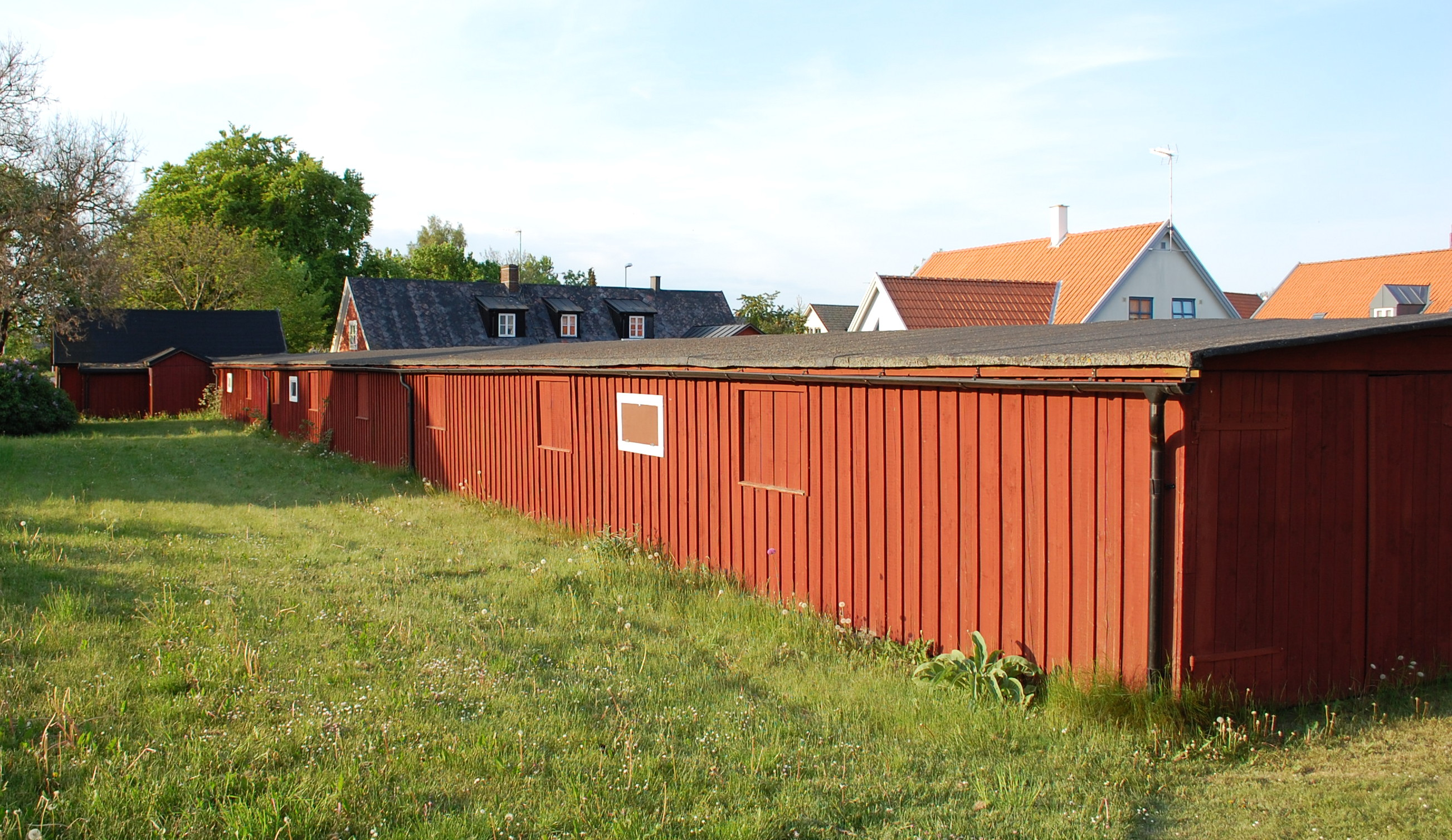 Seilerei Malmström in Ahus